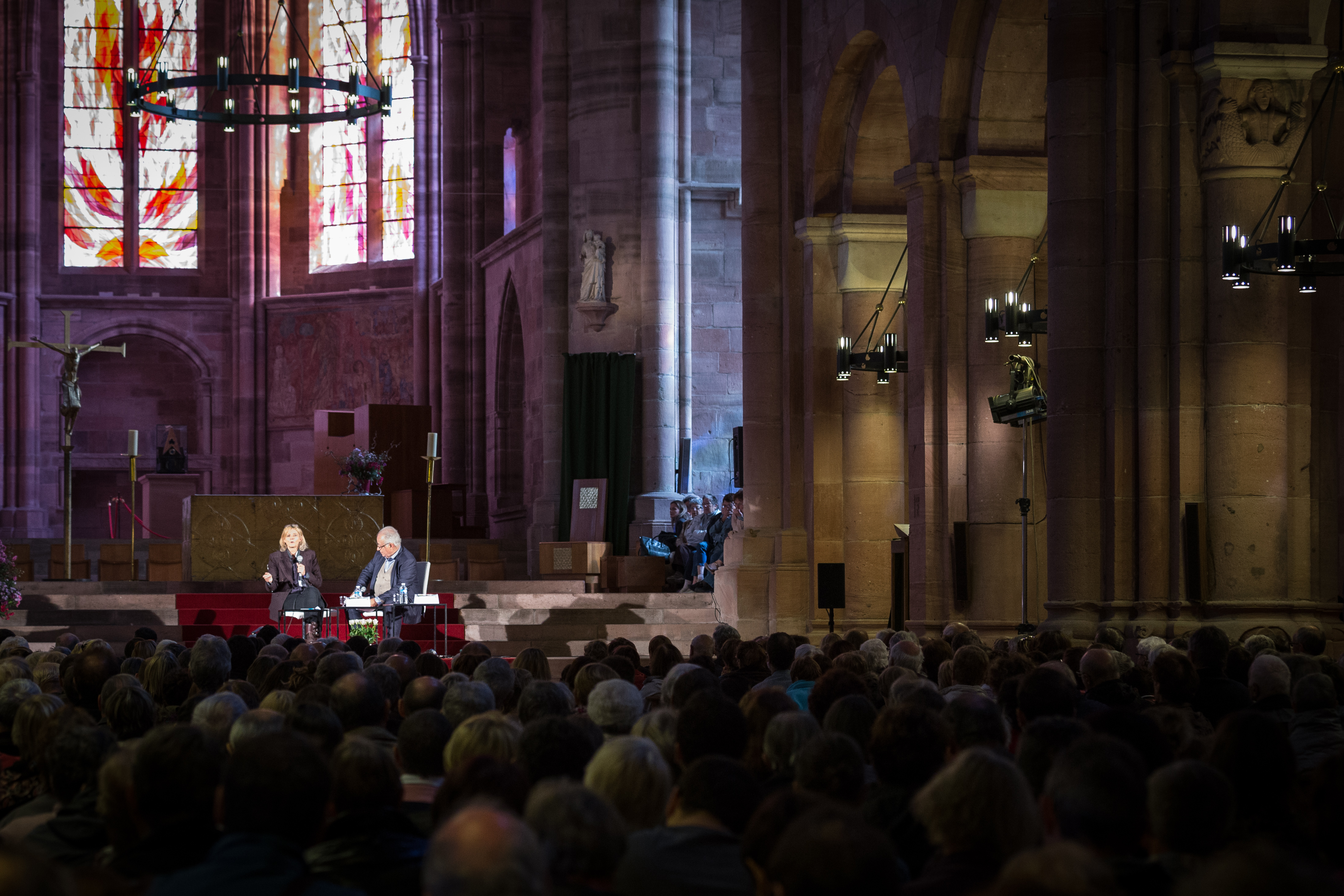 Grand entretien de Florence Aubenas avec Antoine Spire en la cathédrale lors du Festival international de géographie 2015.